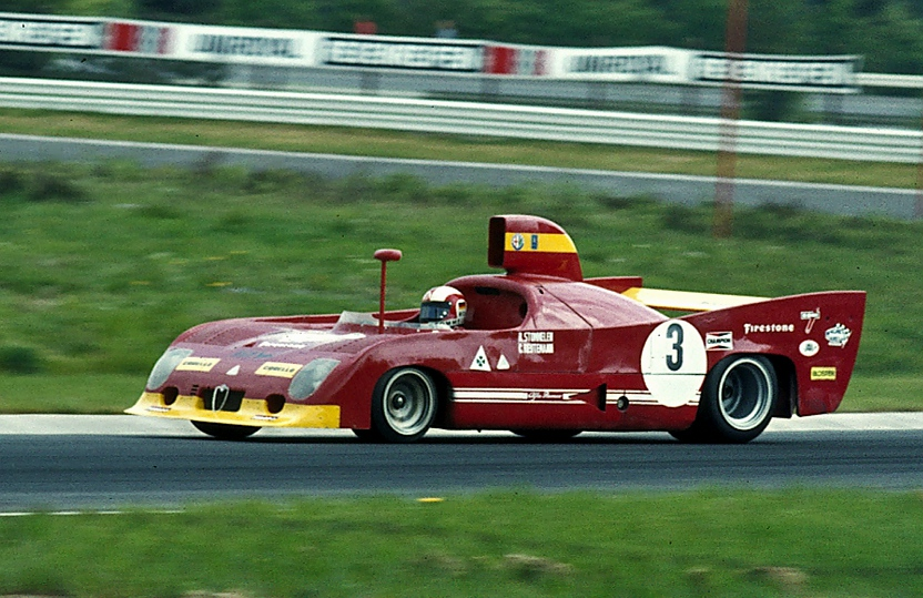 Rolf Stommelen im Alfa Romeo 33 TT 12 beim 1000-km-Rennen auf dem Nürburgring, Südkehre